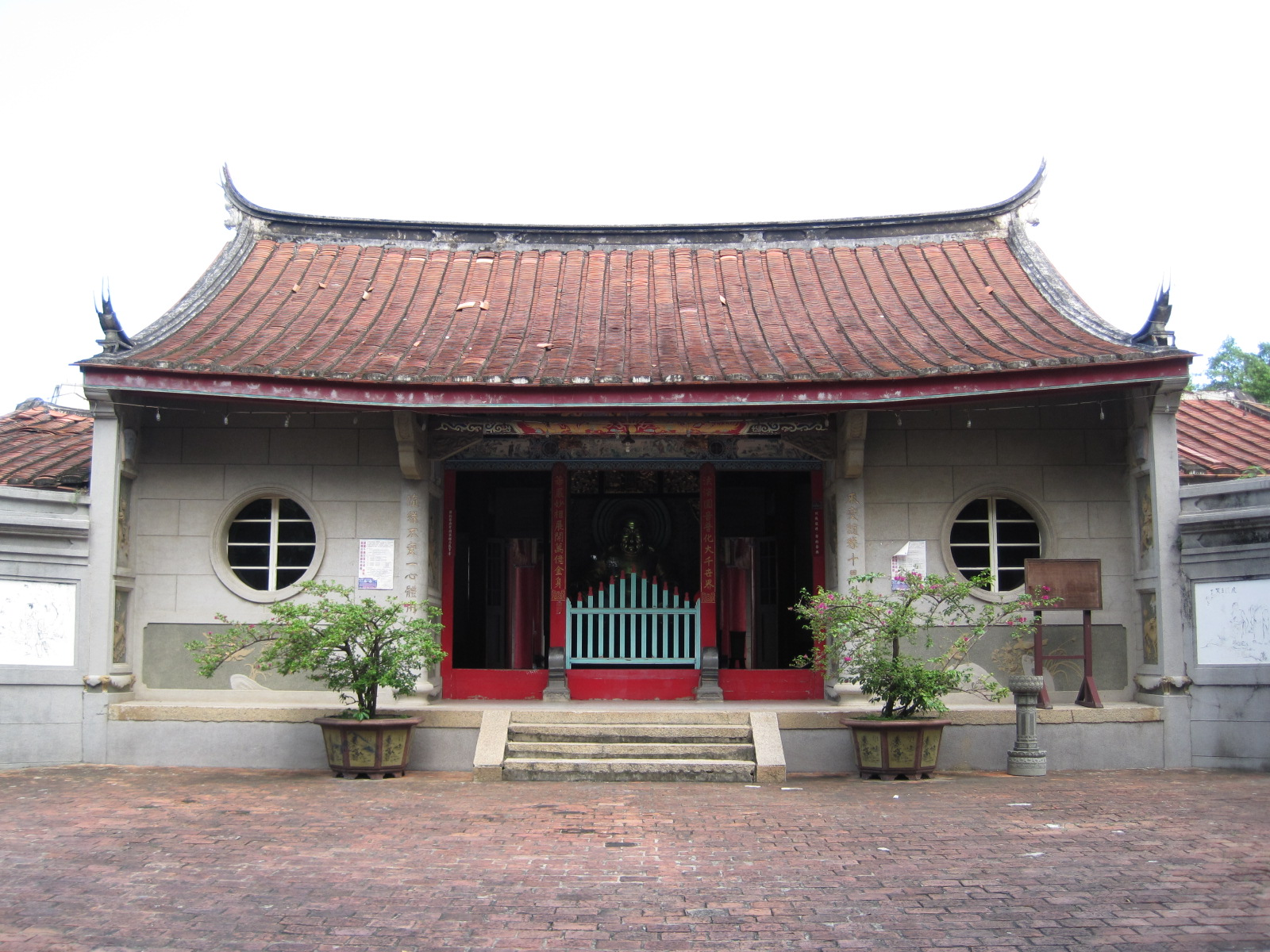 臺南法華寺